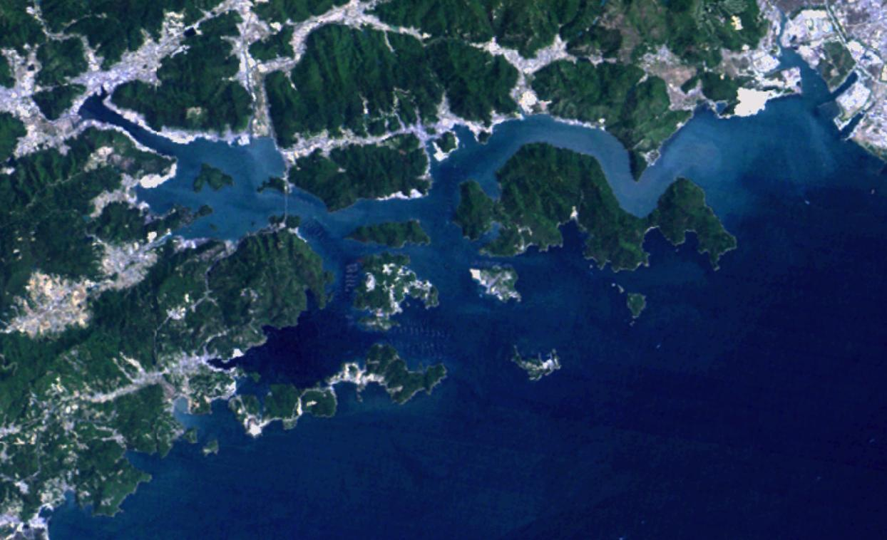 Hinase islands in Bizen, Japan